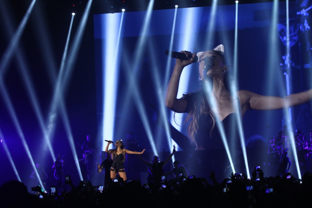 Imagen de la cantante Ariana Grande durante la gira The Honeymoon Tour en su paso por Jakarta (2015).